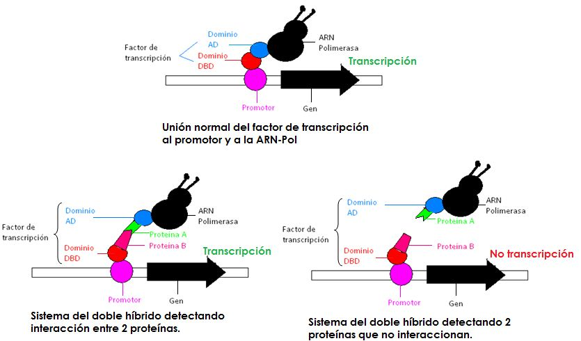 Esquema del funcionamiento del sistema del doble híbrido para detectar interacciones entre proteínas.